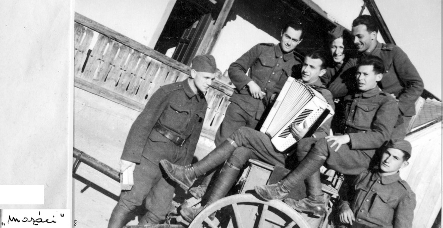 להקת התרבות בגדוד השישי. רפי בנשלום השמאלי. הגדוד השישי, שיאסטי פרפור Siesty Prapor יחידת עבודה במסגרת הצבא הסלובקי עד קייץ 1943. המשרתים ביחידה זו היו מוגנים בפני גירוש לפולין. מרבית המגויסים השתתפו במרד הסלובקי. התצלומים בזכות היותו של רפי צלם רשמי של הגדוד - רפי בנשלום